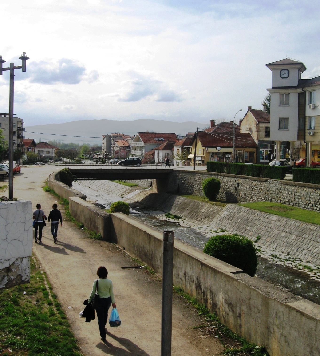 Приобаље Врле у Сурдулици.